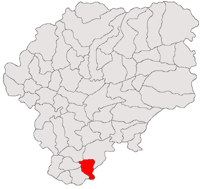 Categorie:Hărţi ale judeţului Bistriţa-Năsăud